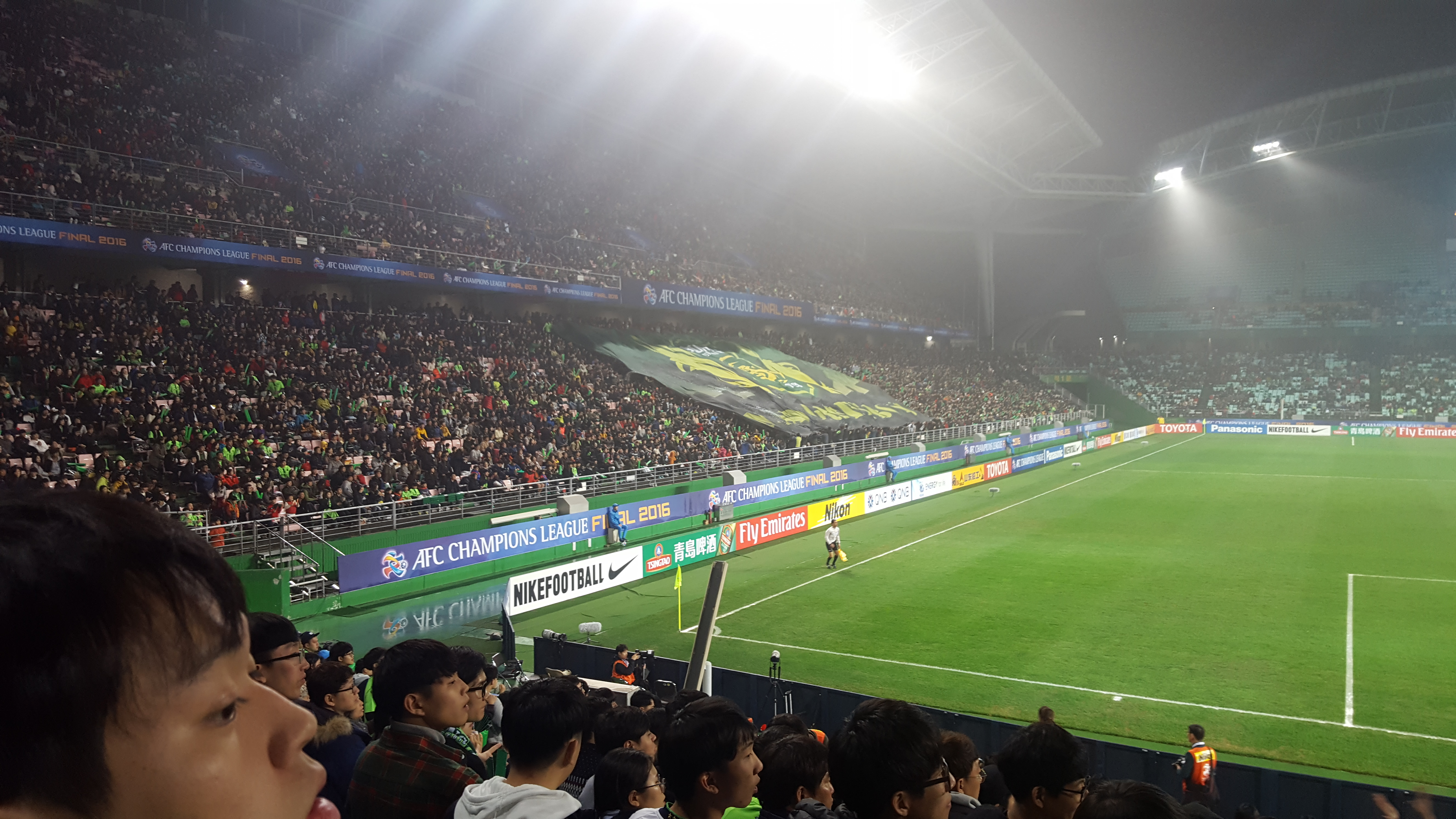 Mad Green Boys in 2016 AFC Champions League Final